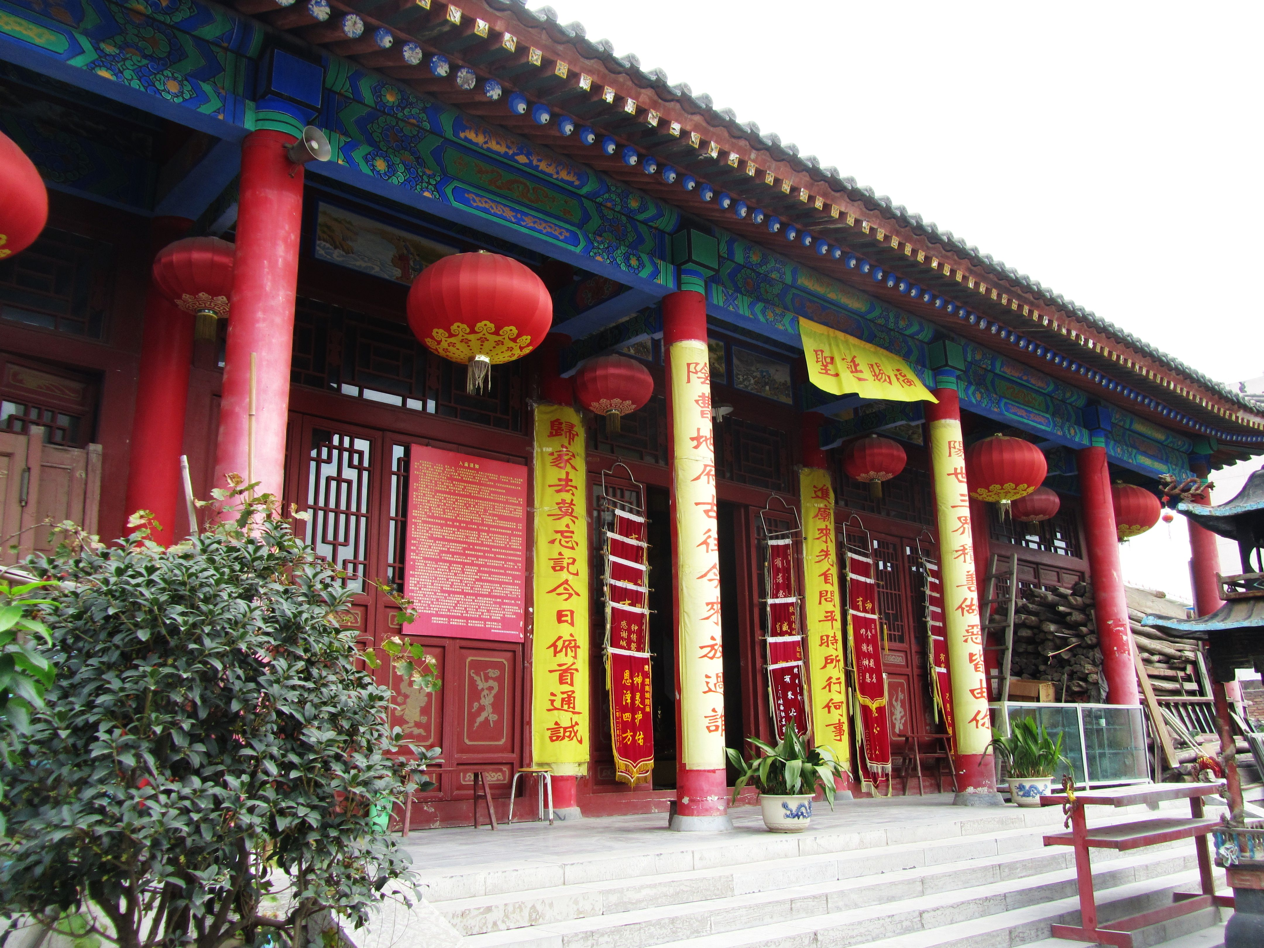 渭南城隍庙，正殿城隍殿。